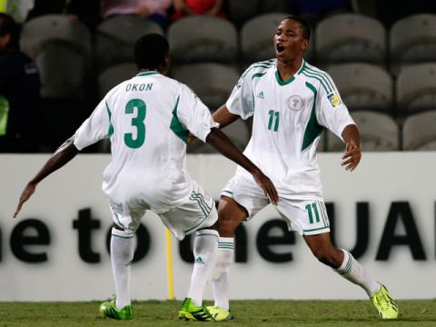 Claro